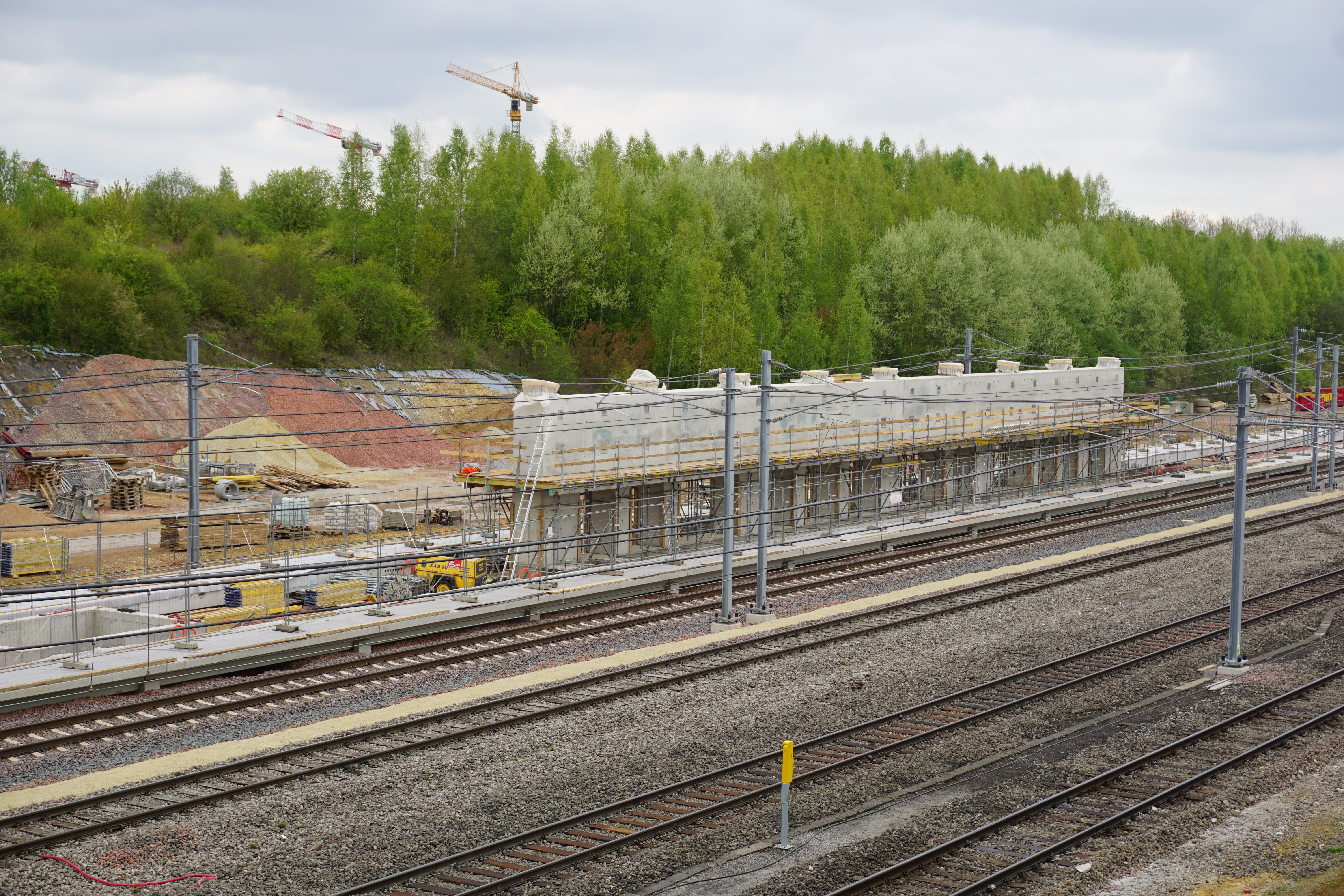 La halte "Howald" des CFL en construction. Vue en direction nord-ouest.